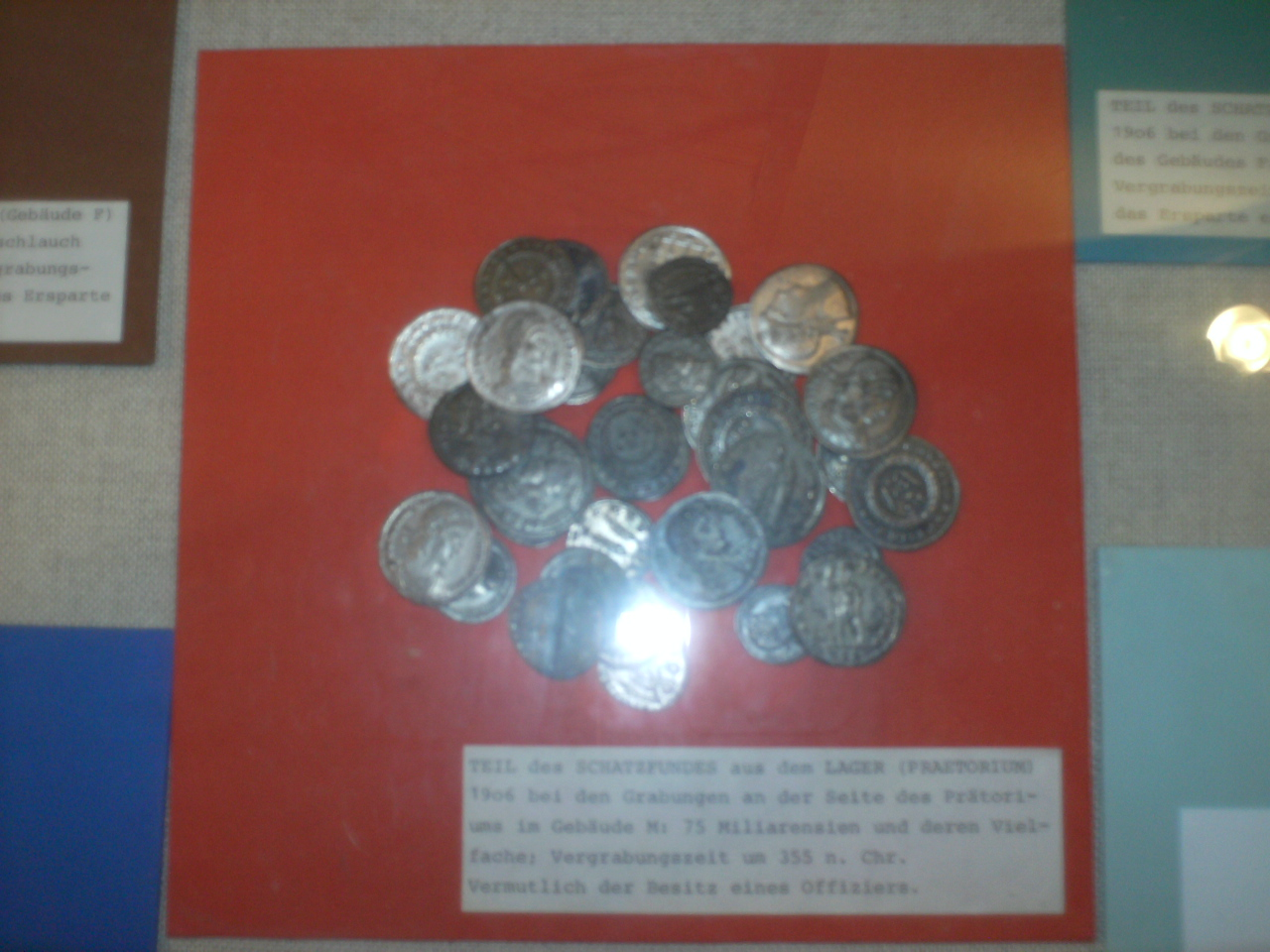 Münzfund aus dem Praetorium des LL Lauriacum (Römermuseum Enns)